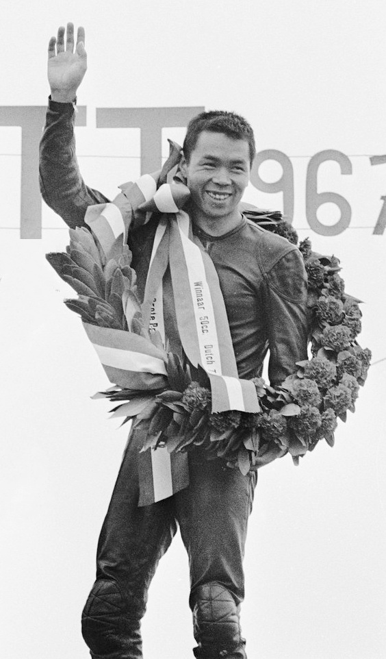 Yoshimi Katayma winnaar 50 cc op het podium